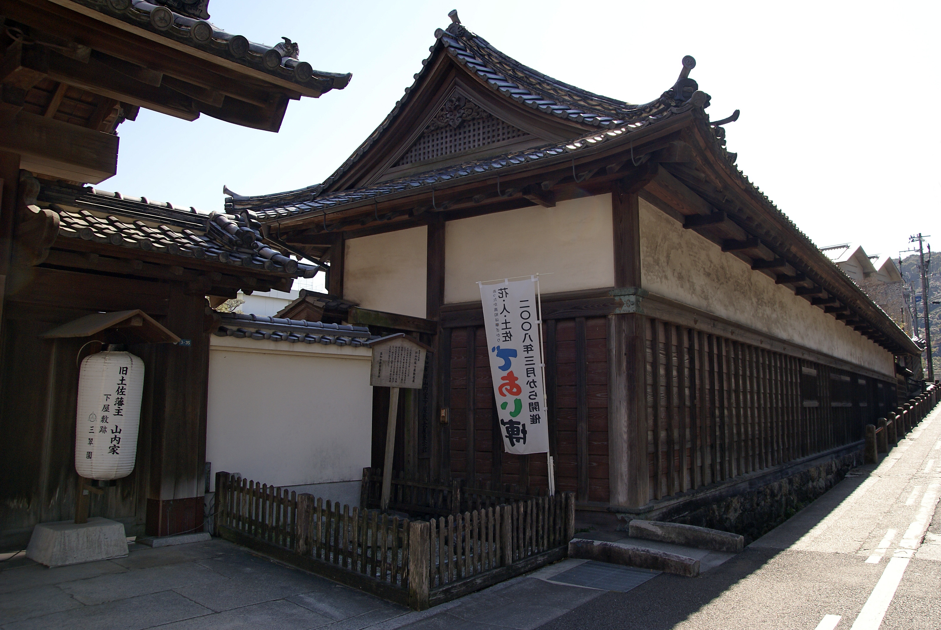 Kyu-Yamauchike Shimoyashiki Nagaya in Kochi, Kochi prefecture, Japan